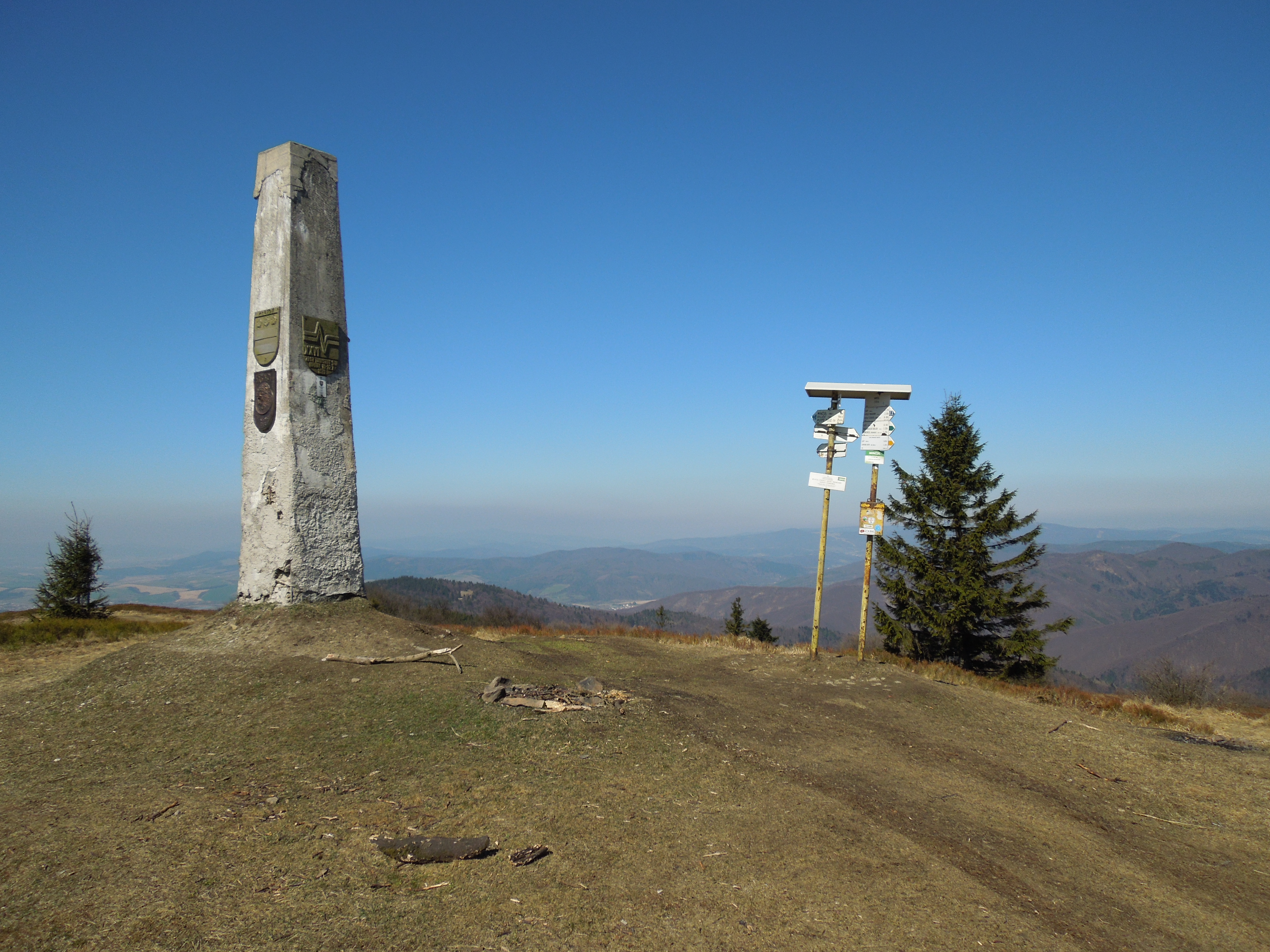 Vrchol Minčola s pylónom a turistickým smerovníkom